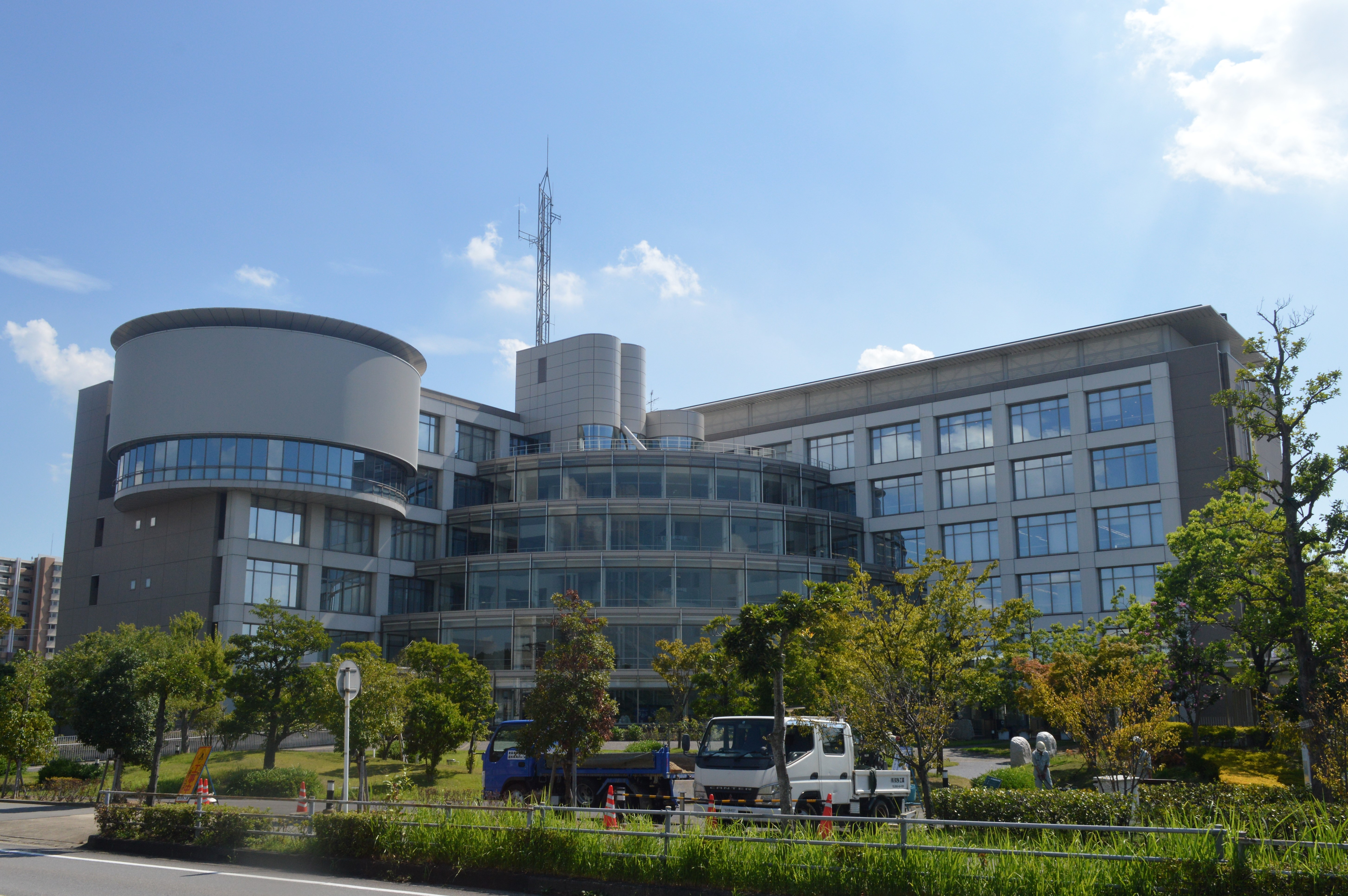 愛知県大府市の大府市役所。